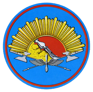 Нарукавная нашивка Воронежского высшего военного авиационного инженерного училища (военного института)